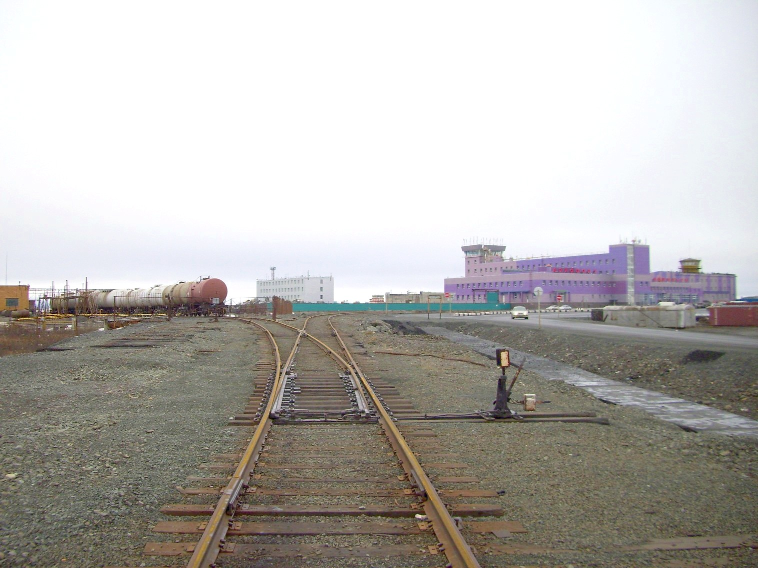 Норильская железная дорога, ветка в аэропорт Алыкель